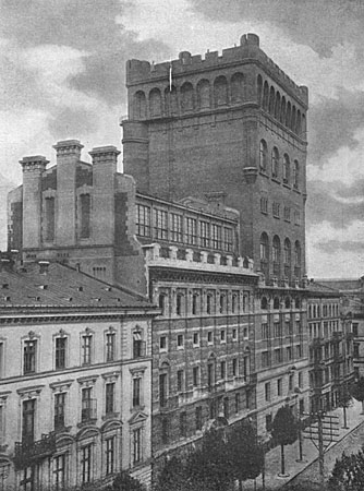 Budynek PAST przy ulicy Zielnej.